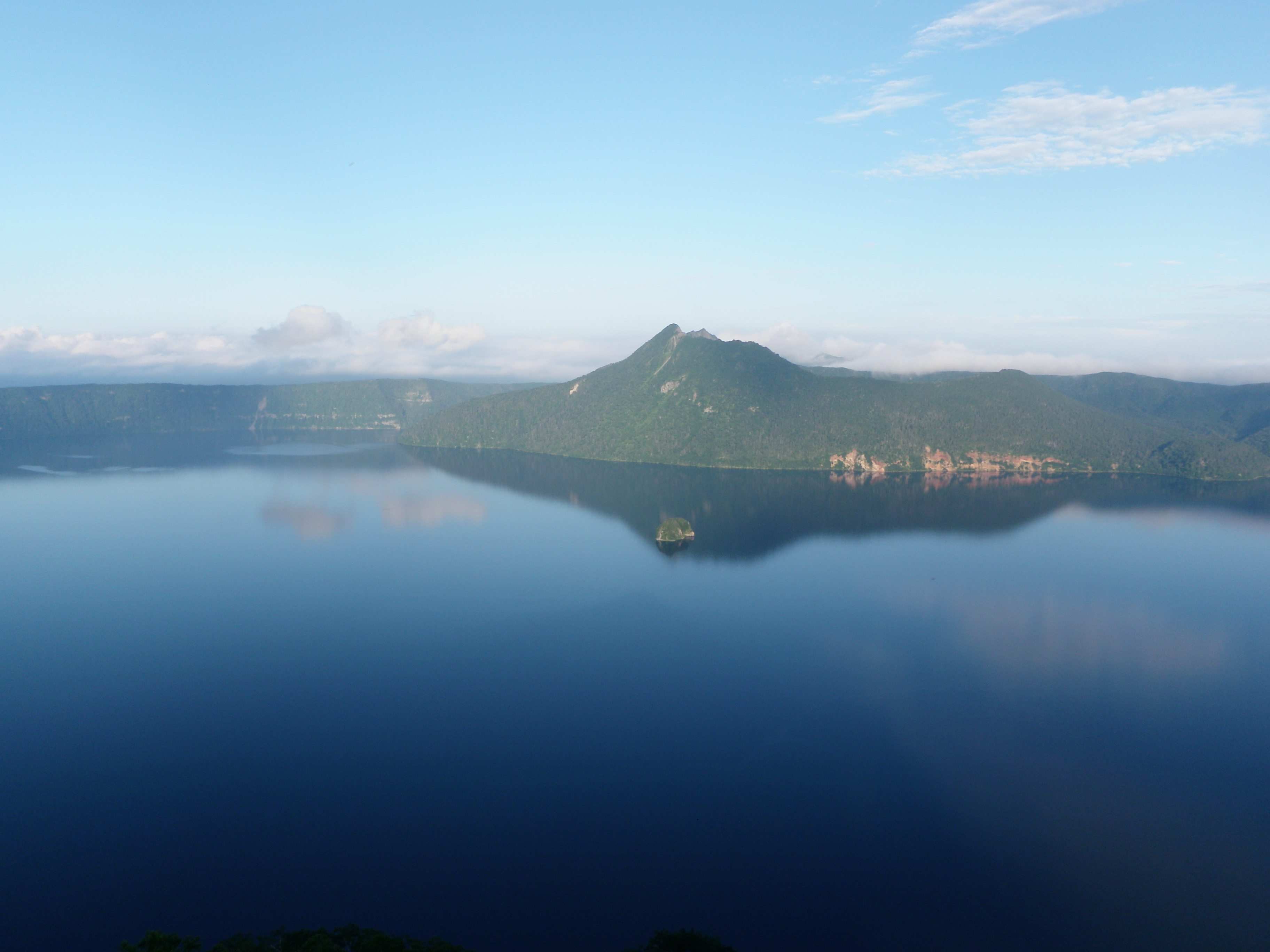 Lake_Mashu_2009.jpg